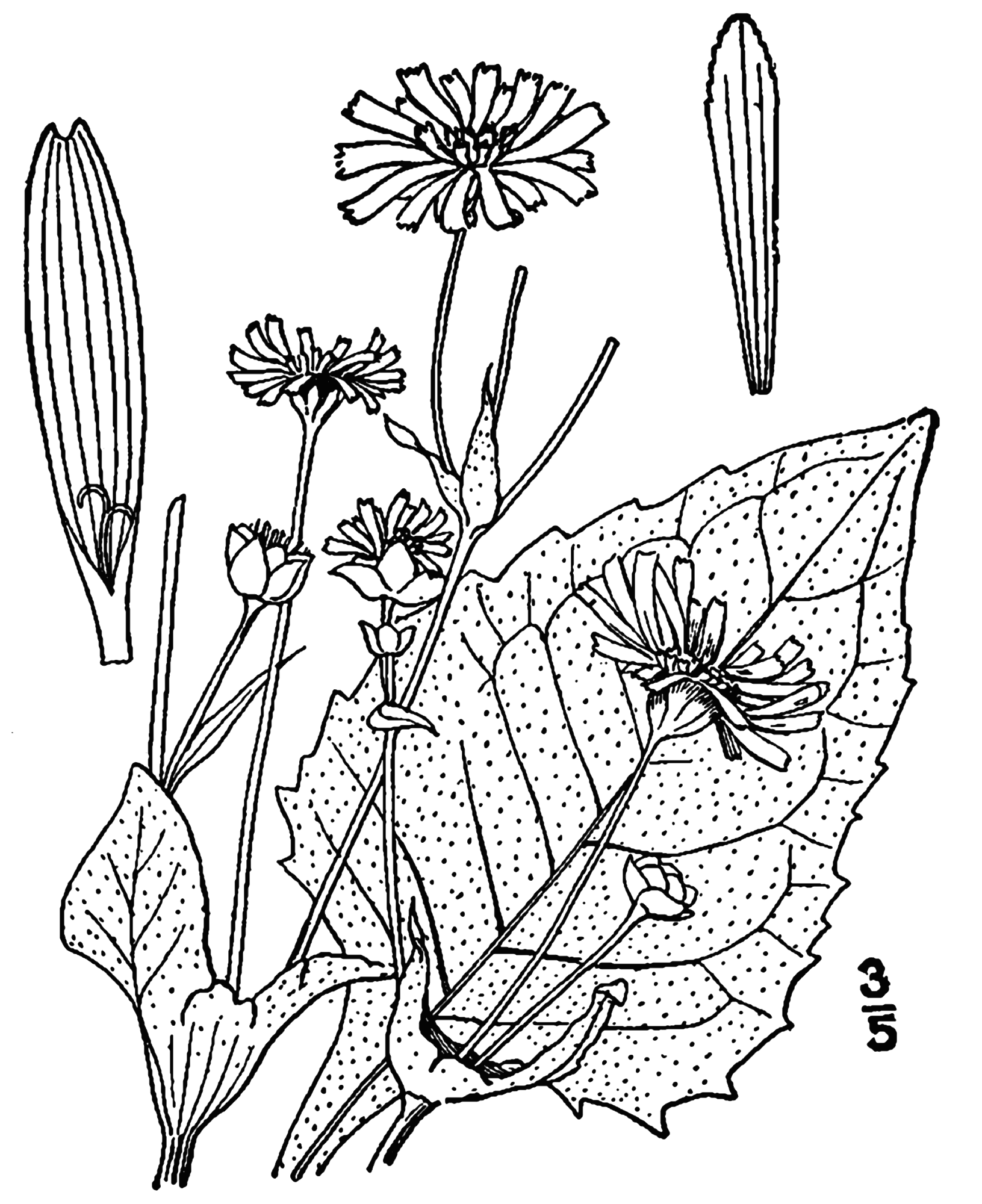 Silphium perfoliatum